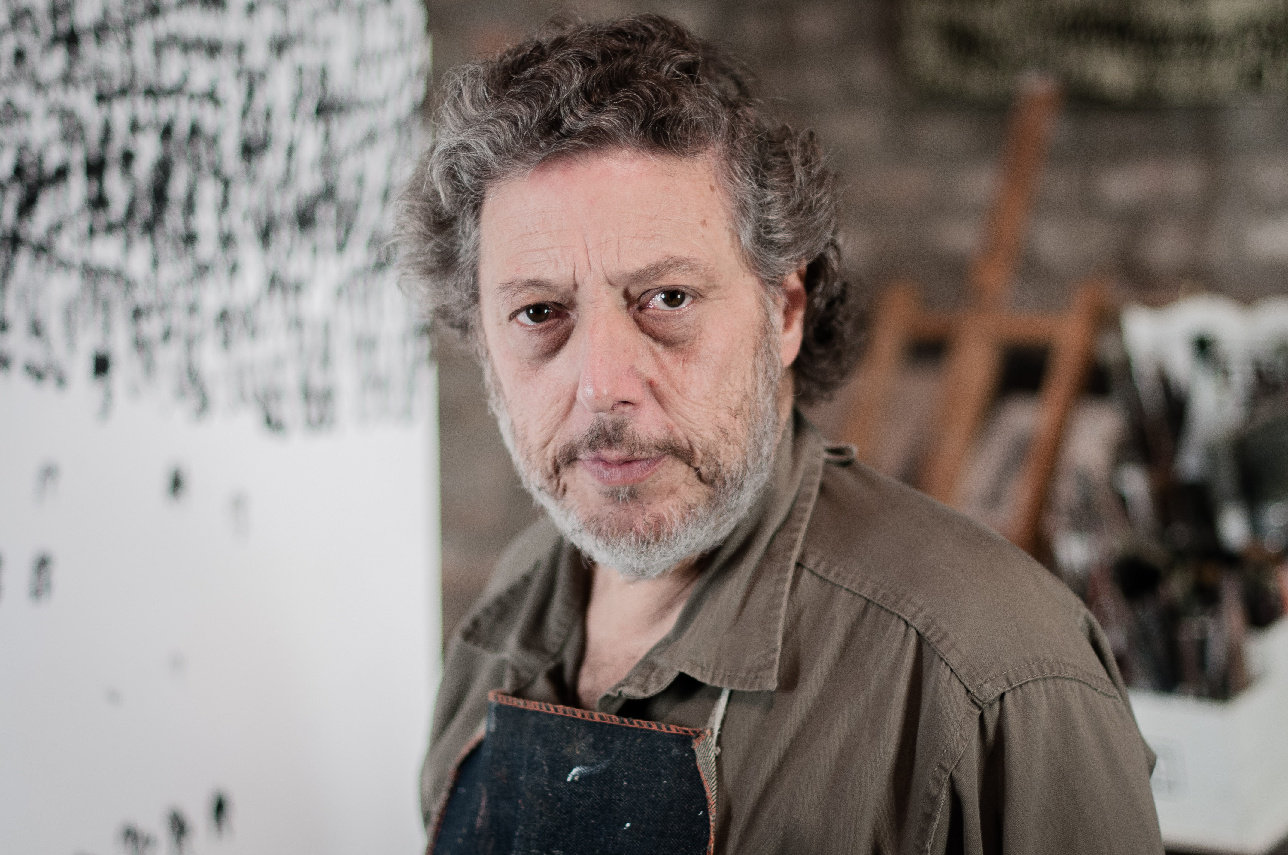 Andrés Waissman en su taller